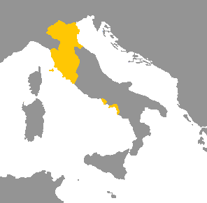 Idioma etrusco